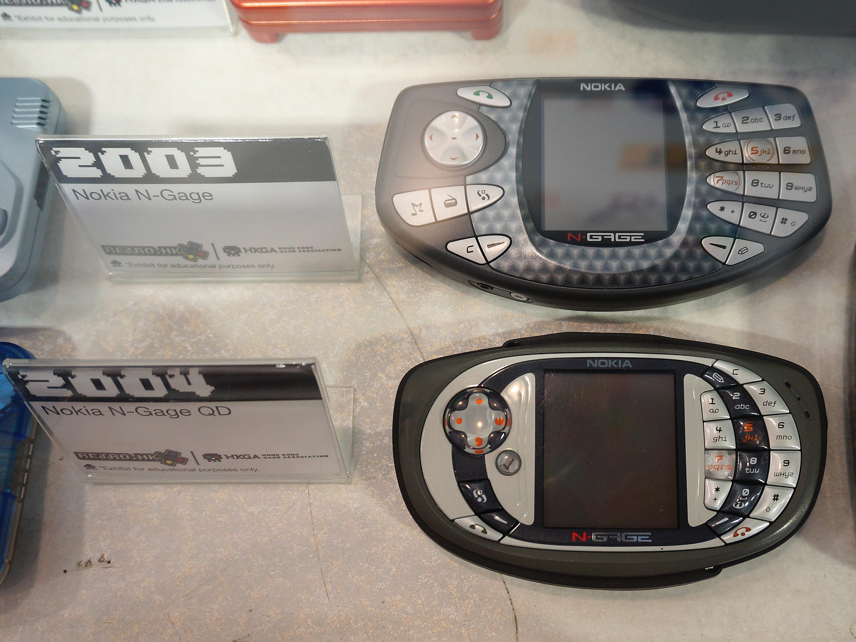 中文（台灣）: 2019夏日電玩展，復古遊戲展覽區展示的N-Gage與N-Gage QD。